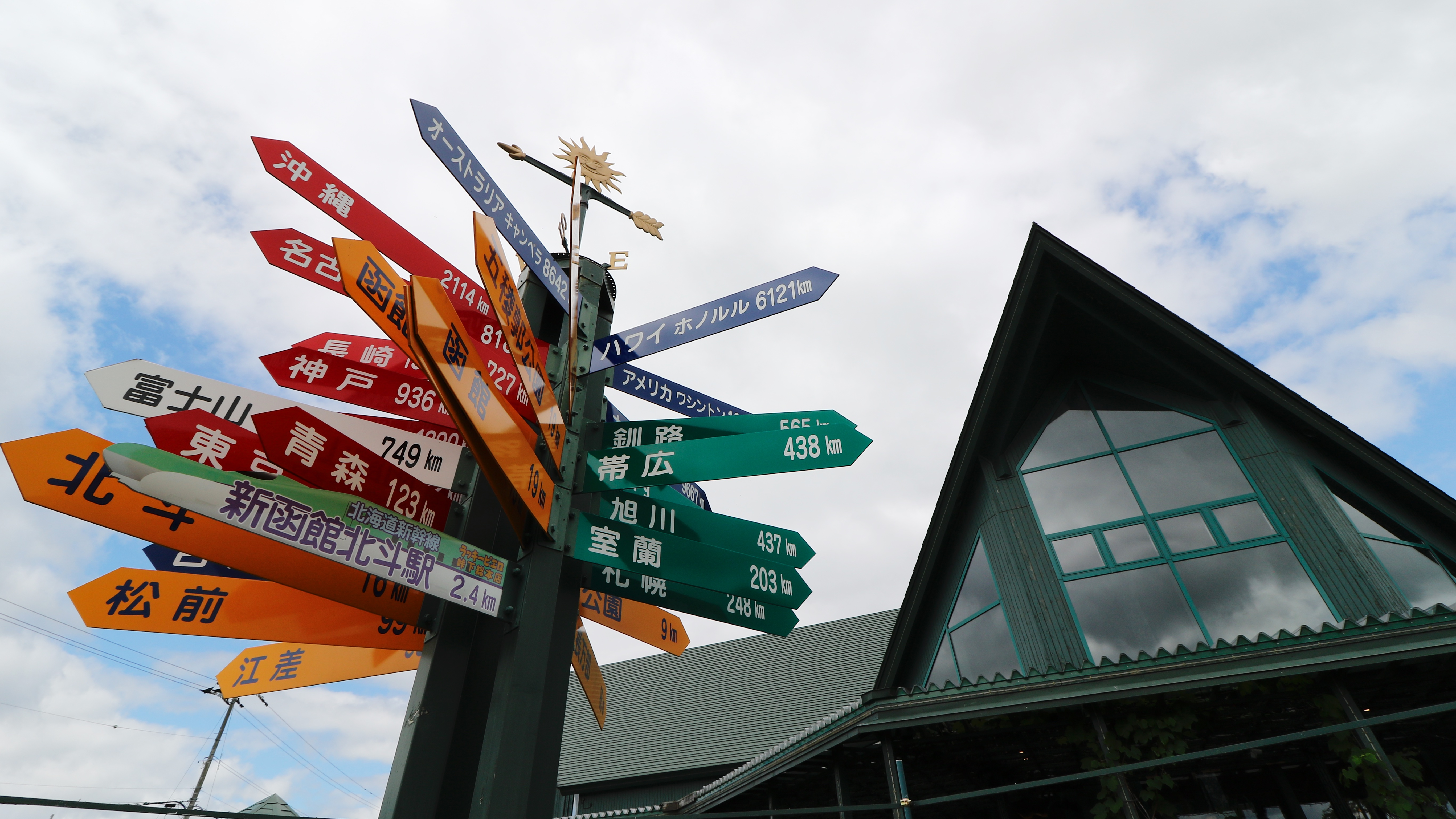 @ラッキーピエロ峠下総本店